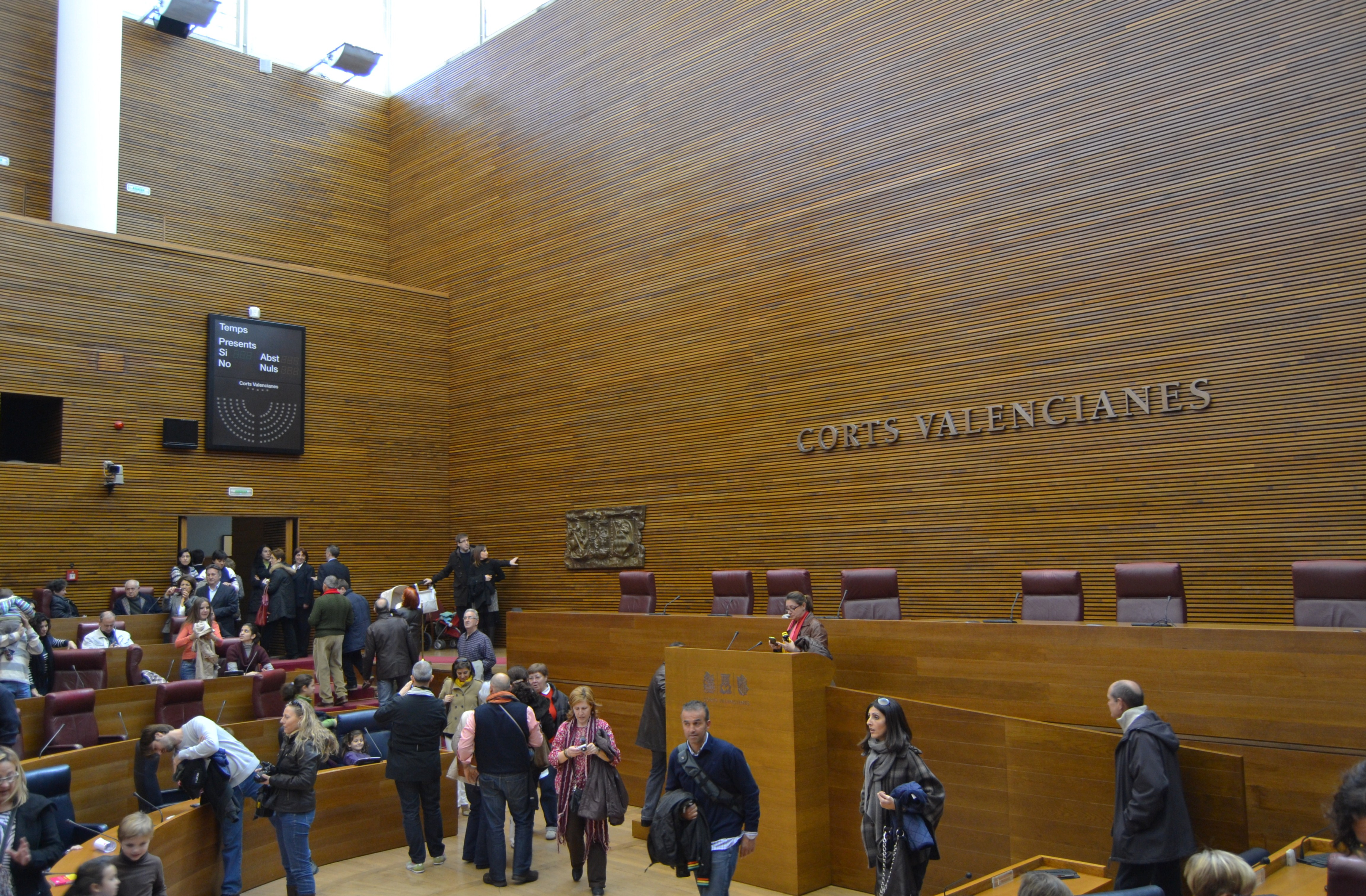 Hemicicle de les Corts Valencianes, València.